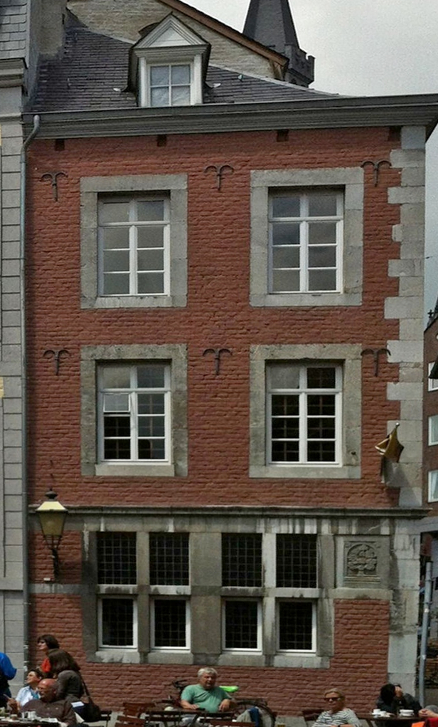 Haus zum Lindenbaum (rechtes Gebäude, Blick vom Hof), Rückseite des Couven-Museums in Aachen